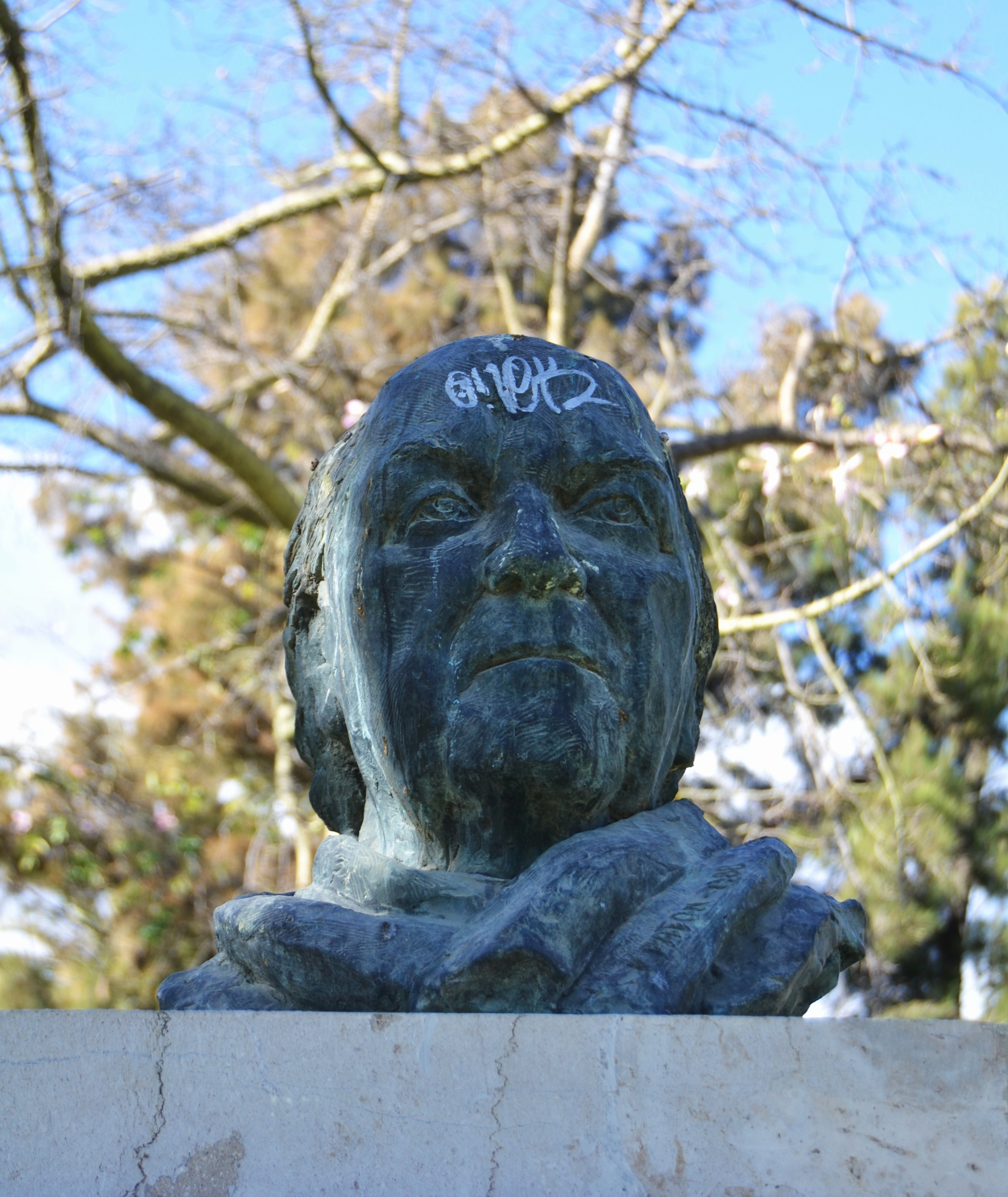 Bust de Felipe Garin Ortiz de Taranco als jardins del Real de València.